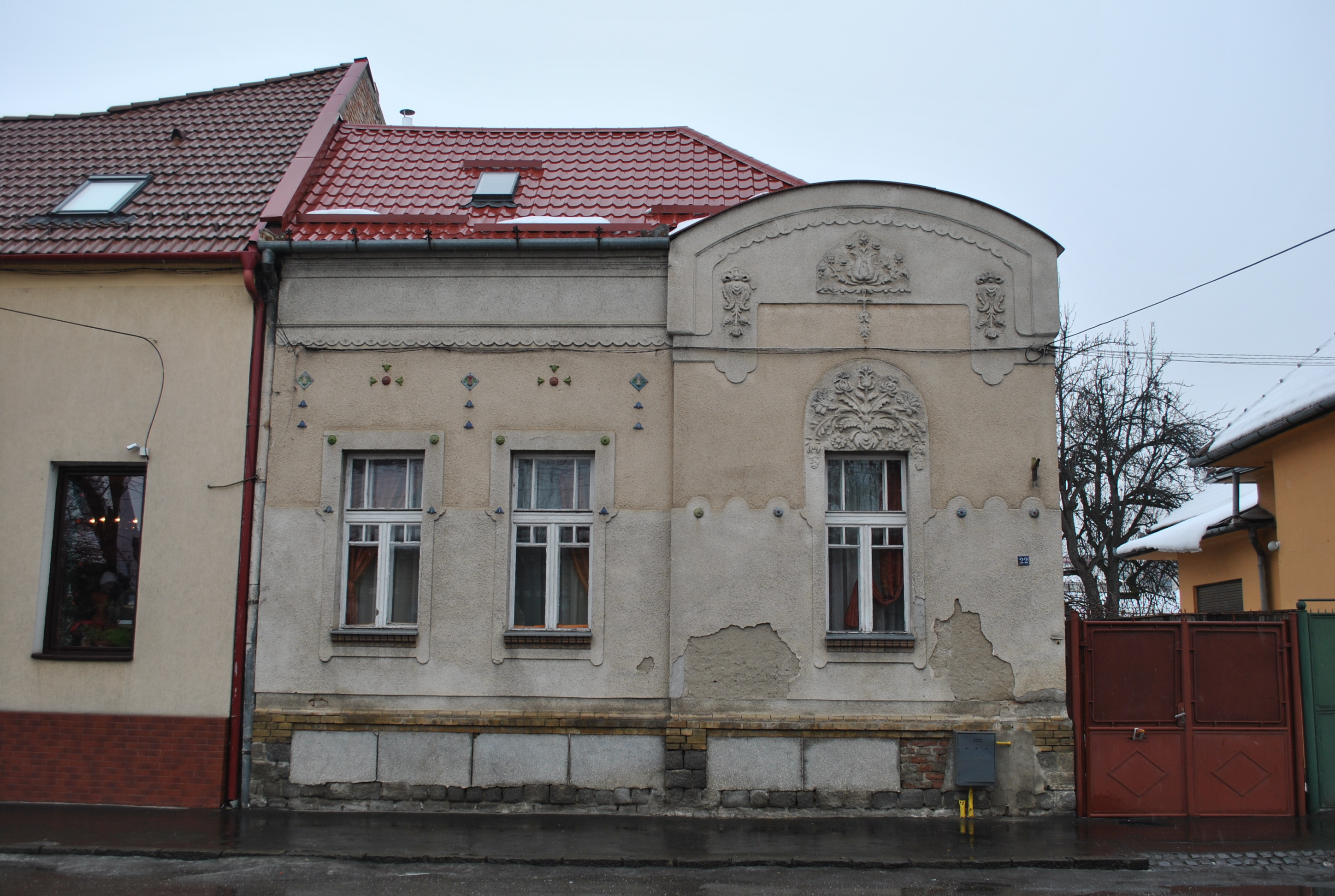 Casă, înc. sec. XX